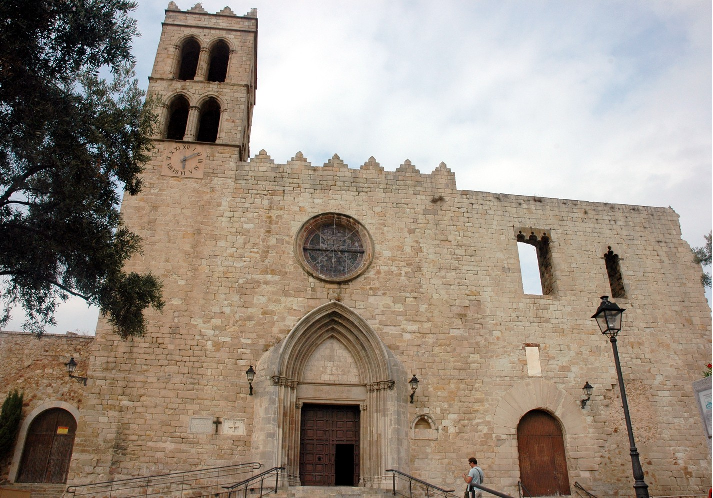 Santa Maria de Blanes, Girona, (Catalunya).